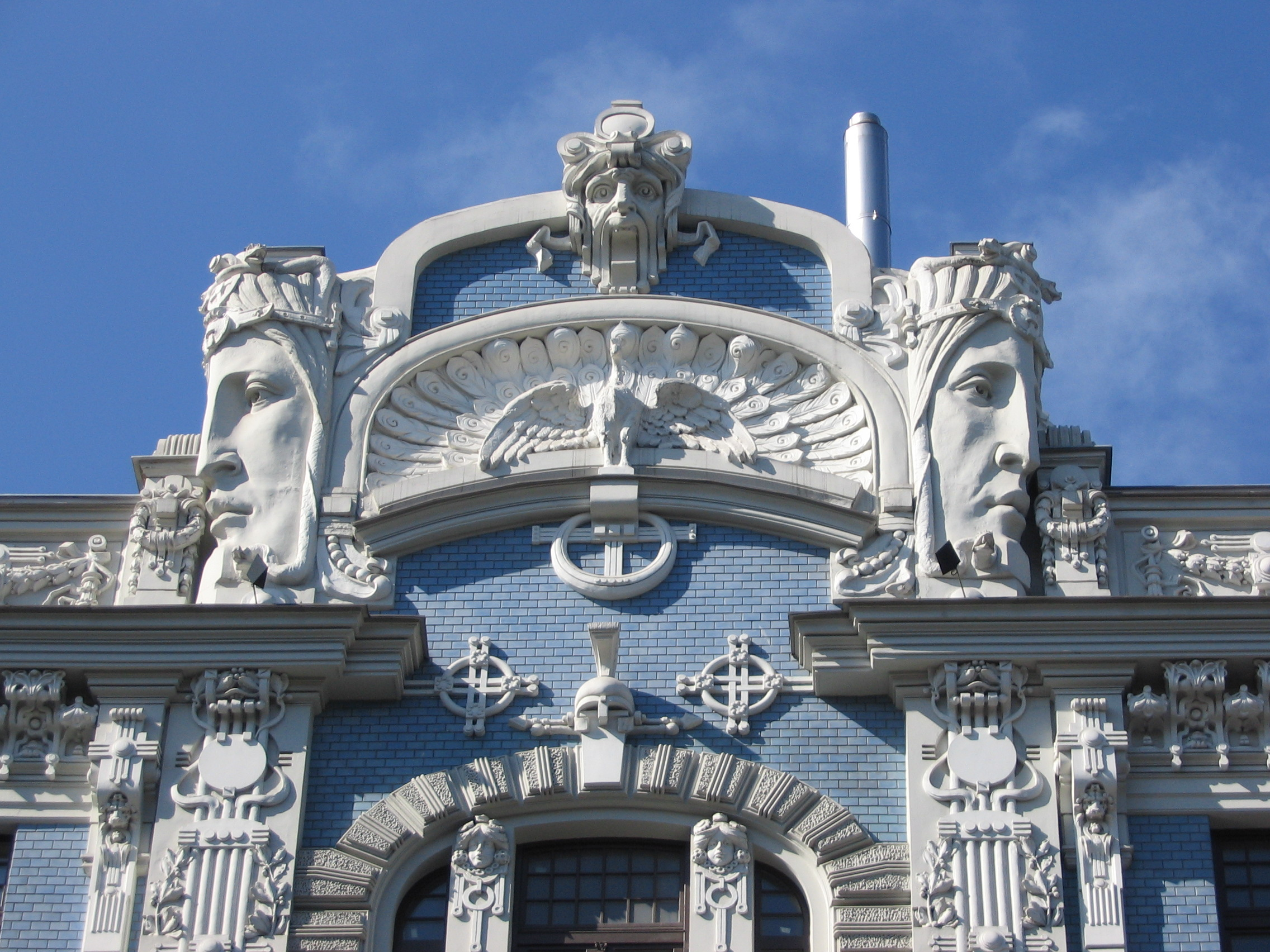 eigen foto - art nouveau geveldecoratie in Riga